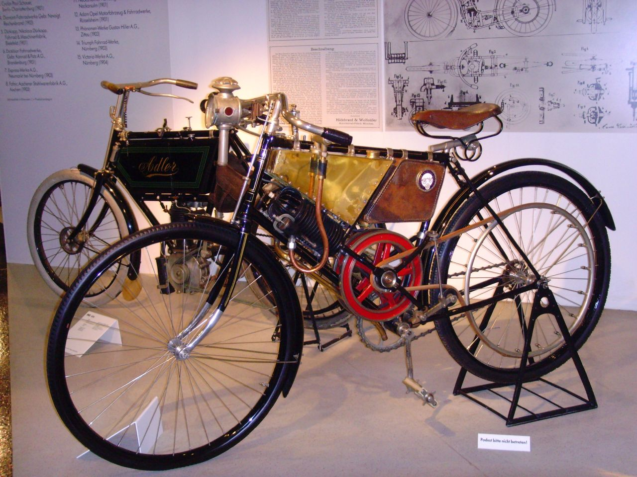 Deutsches Zweirad- und NSU-Museum Neckarsulm